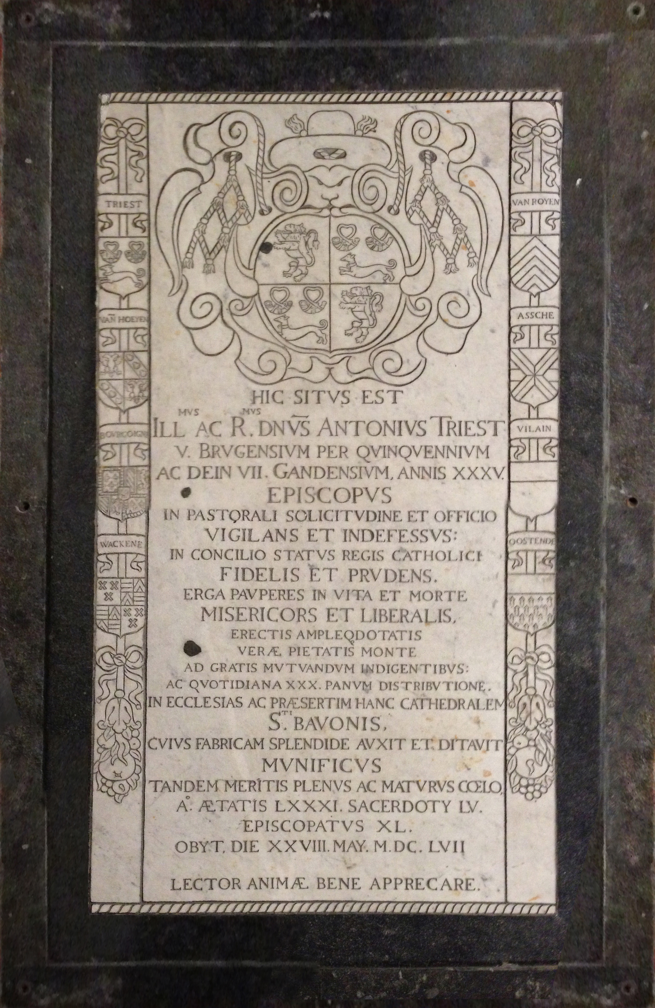 Grafplaat bisschop Antonius Triest in de crypte van de Sint-Baafskathedraal te Gent